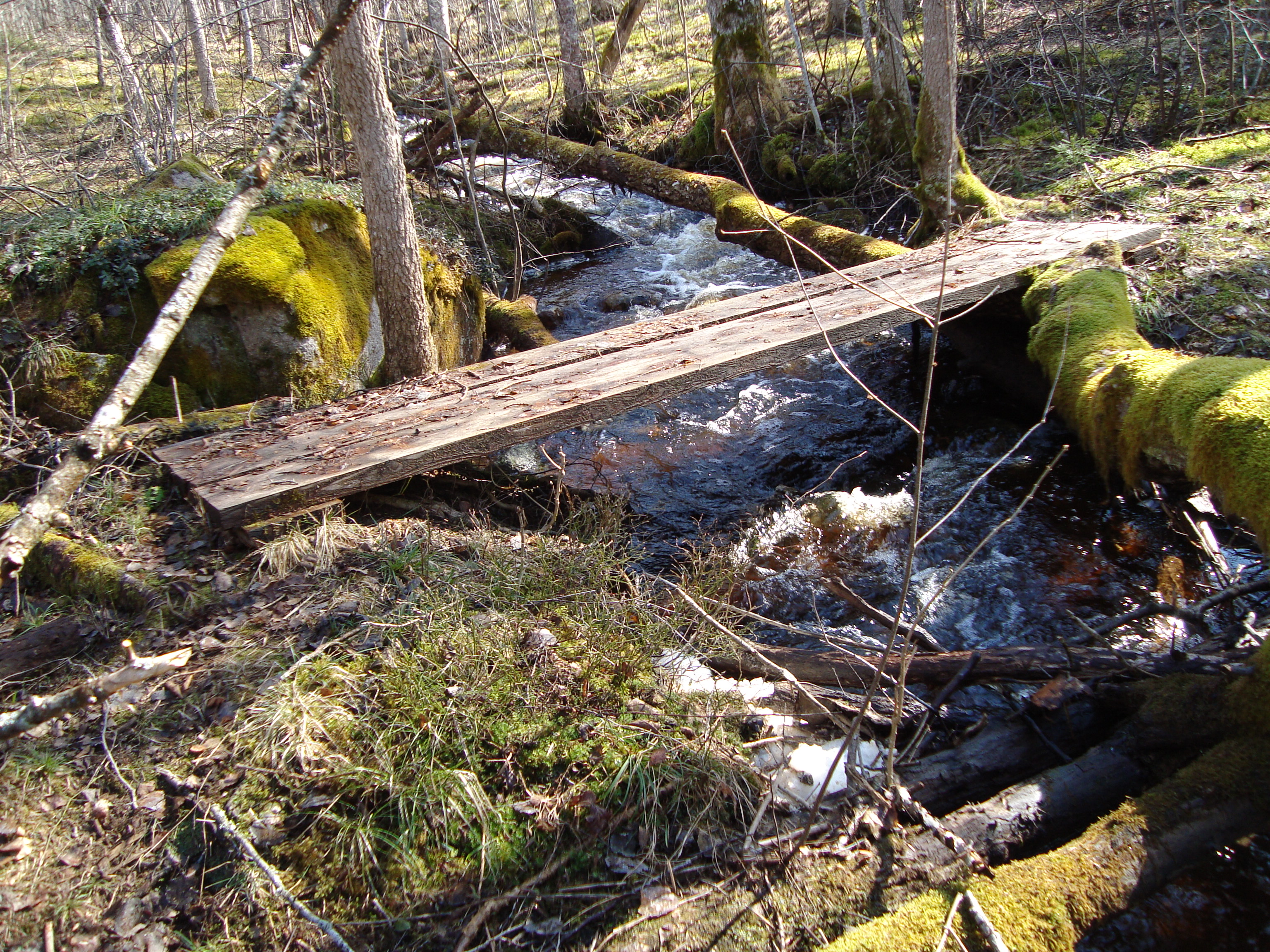 Realsbo hage, Hedemora kommun, Sverige.